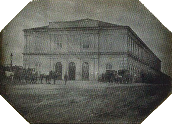 Der Gloggnitzer Bahnhof in Wien, Daguerreotypie.